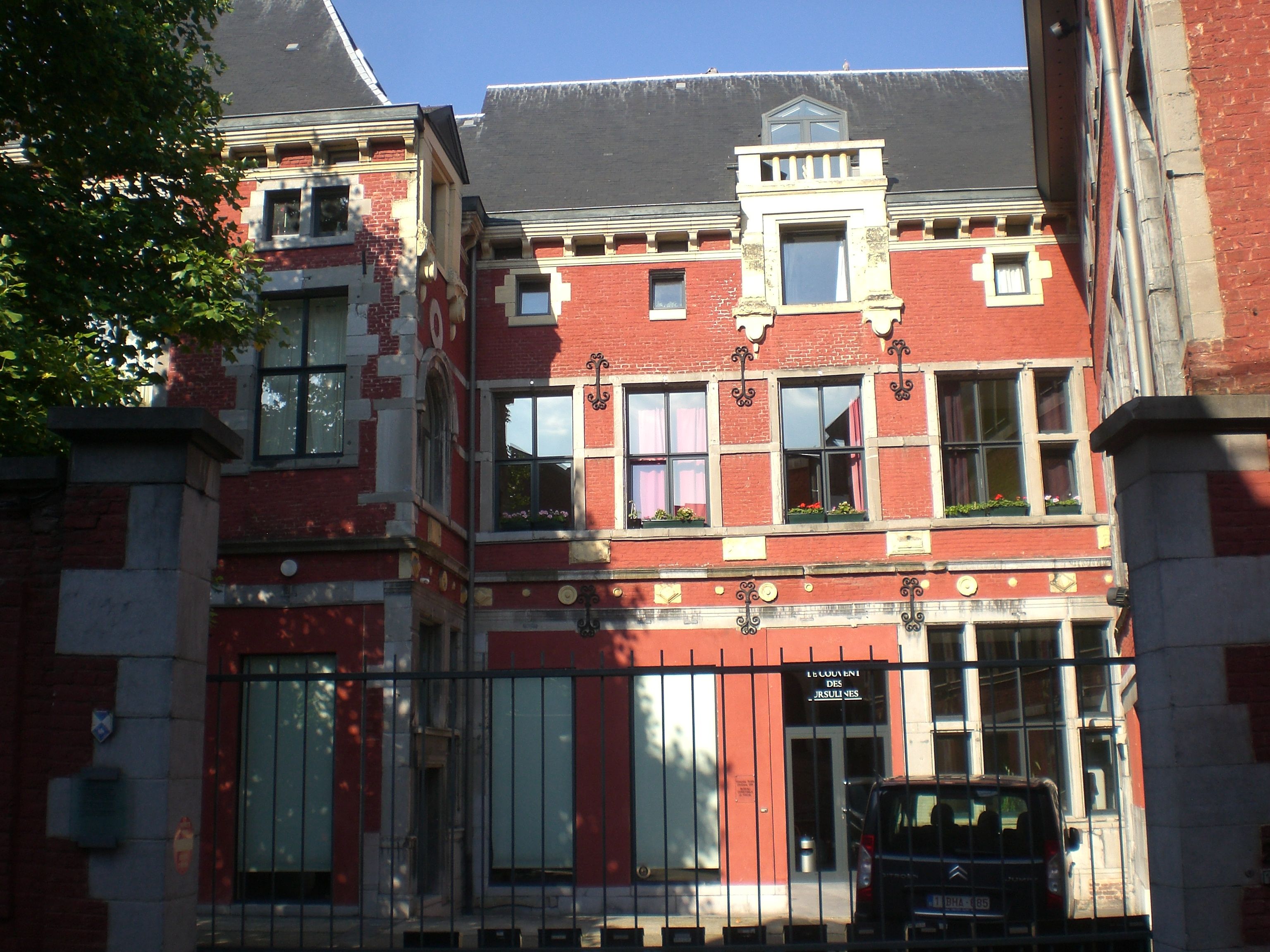 Couvent des Ursulines de Liège en Hors-Chateau au pied des escaliers de Buren